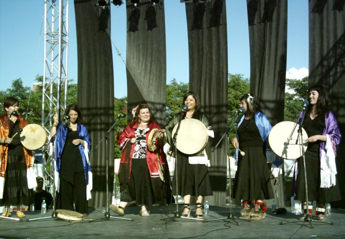 Spectacle de musique traditionnelle à la place Émilie-Gamelin à Montréal lors du festival Présence autochtone, juin 2008